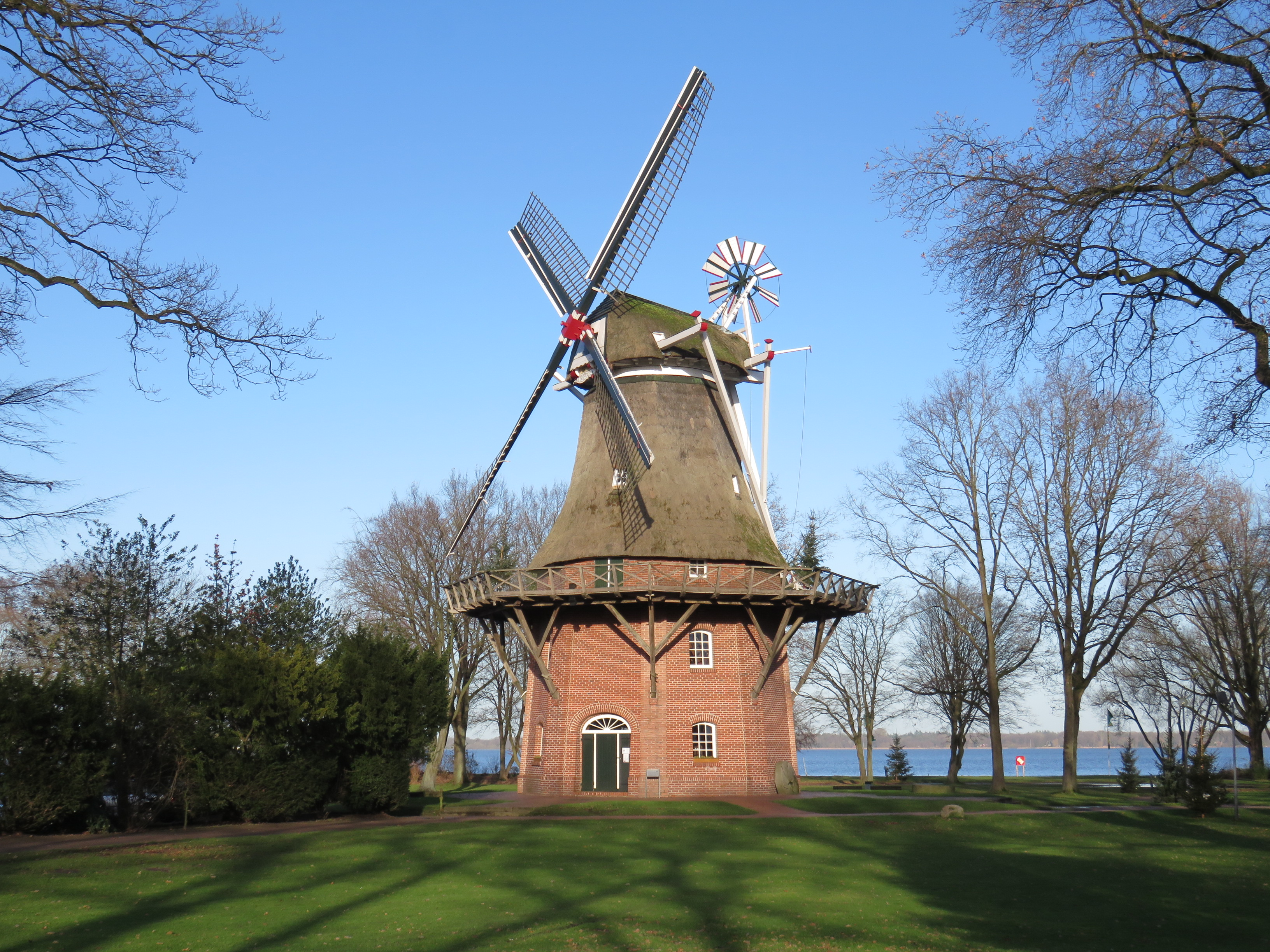 Die Kappenwindmühle im Kurpark von Bad Zwischenahn